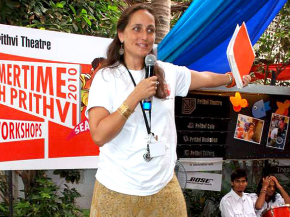 Sanjana Kapoor at Prithvi Summertime 2010 launch